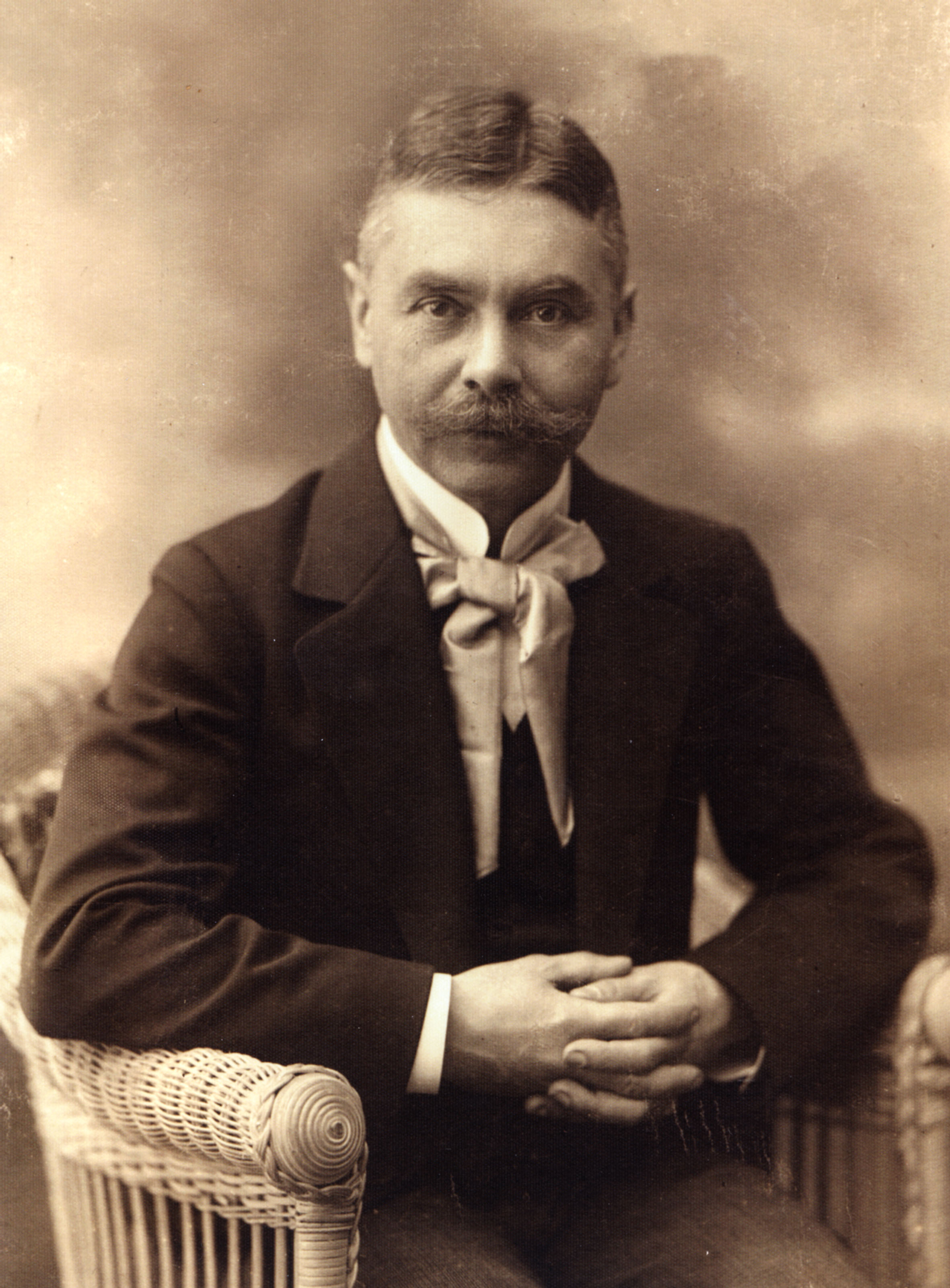 Karl Hürthle (1914), deutscher Physiologe und Kreislaufforscher